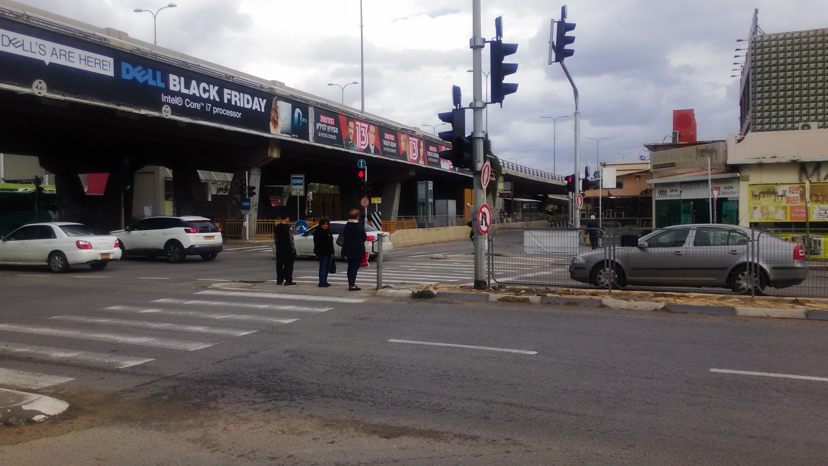 מחלף מוטה גור